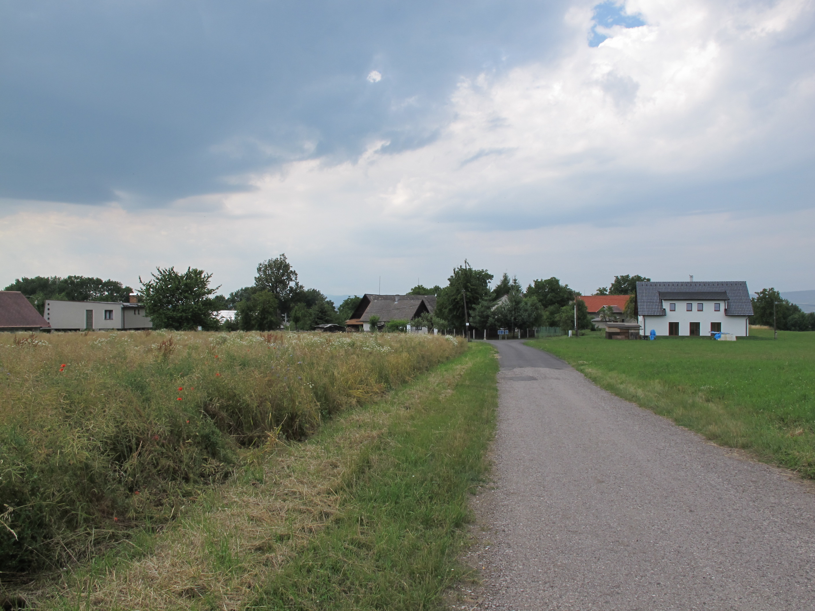 Kadeřavec u Turnova.